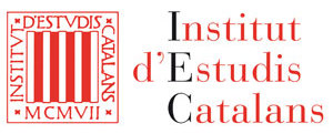 Logo del IEC